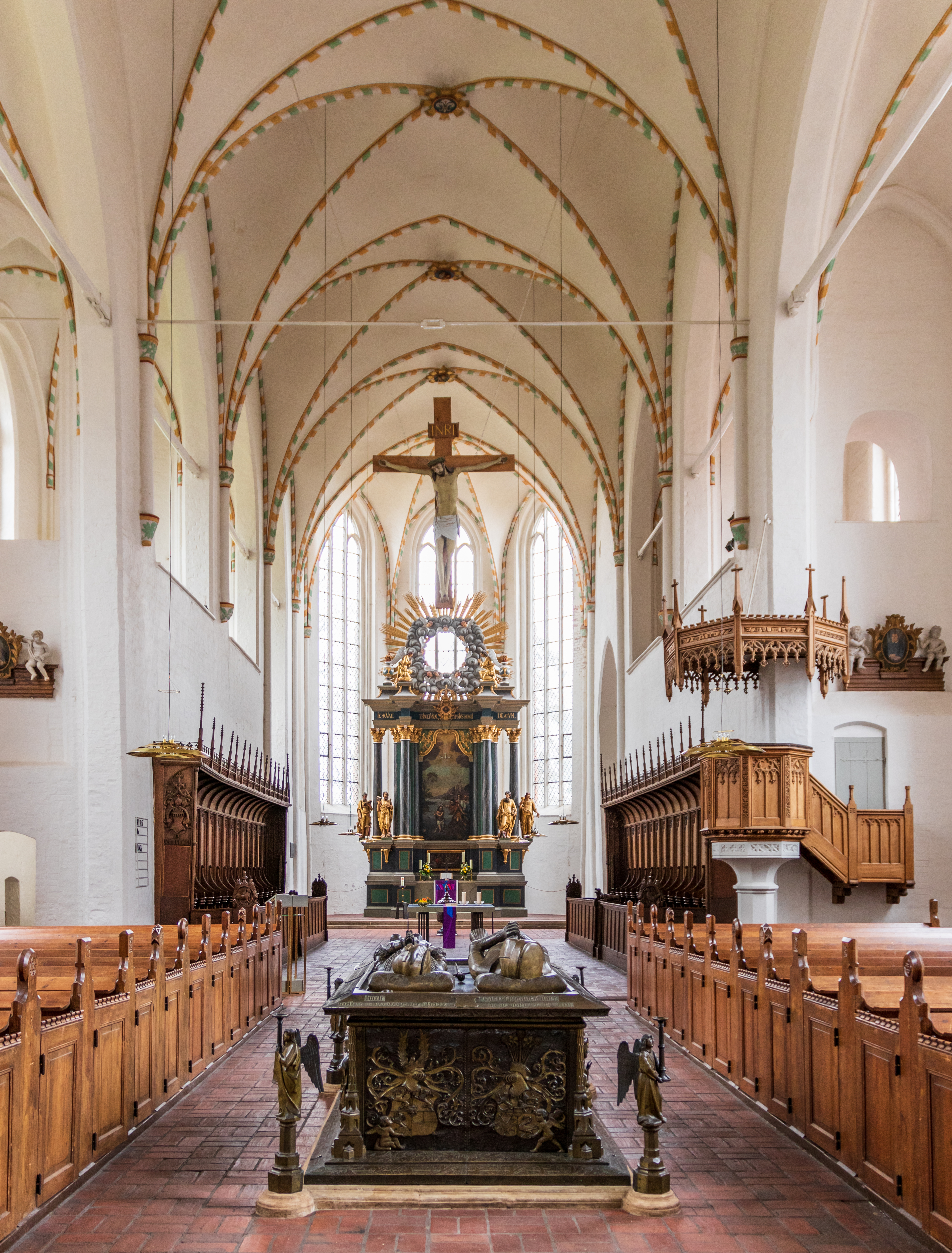 Klosterkirche Bordesholm